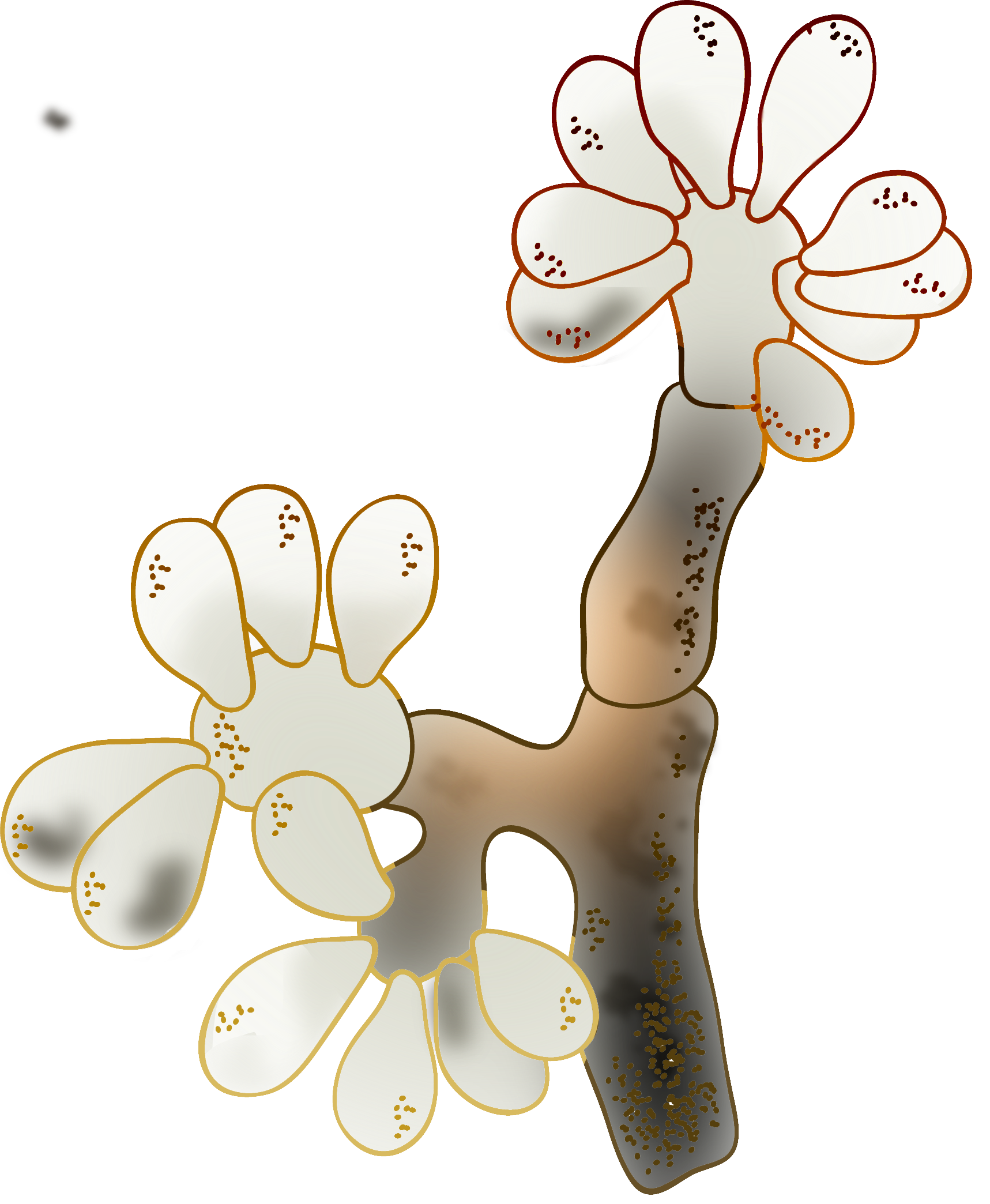 Representación artística de un conidióforo de Botritys sp. al microscopio